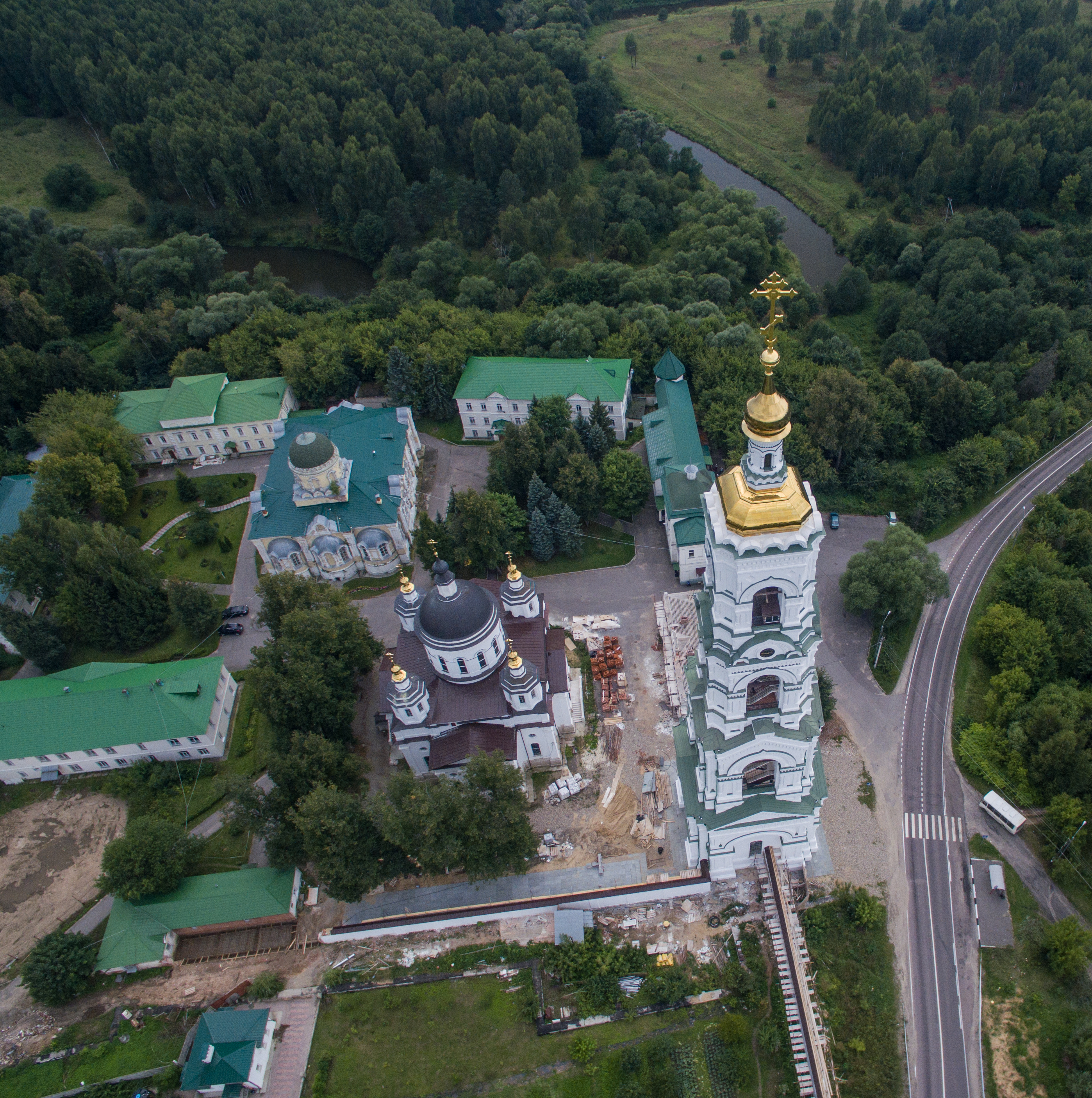 Николаевская Берлюковская пустынь: Авдотьино, Ногинский район, Московская область